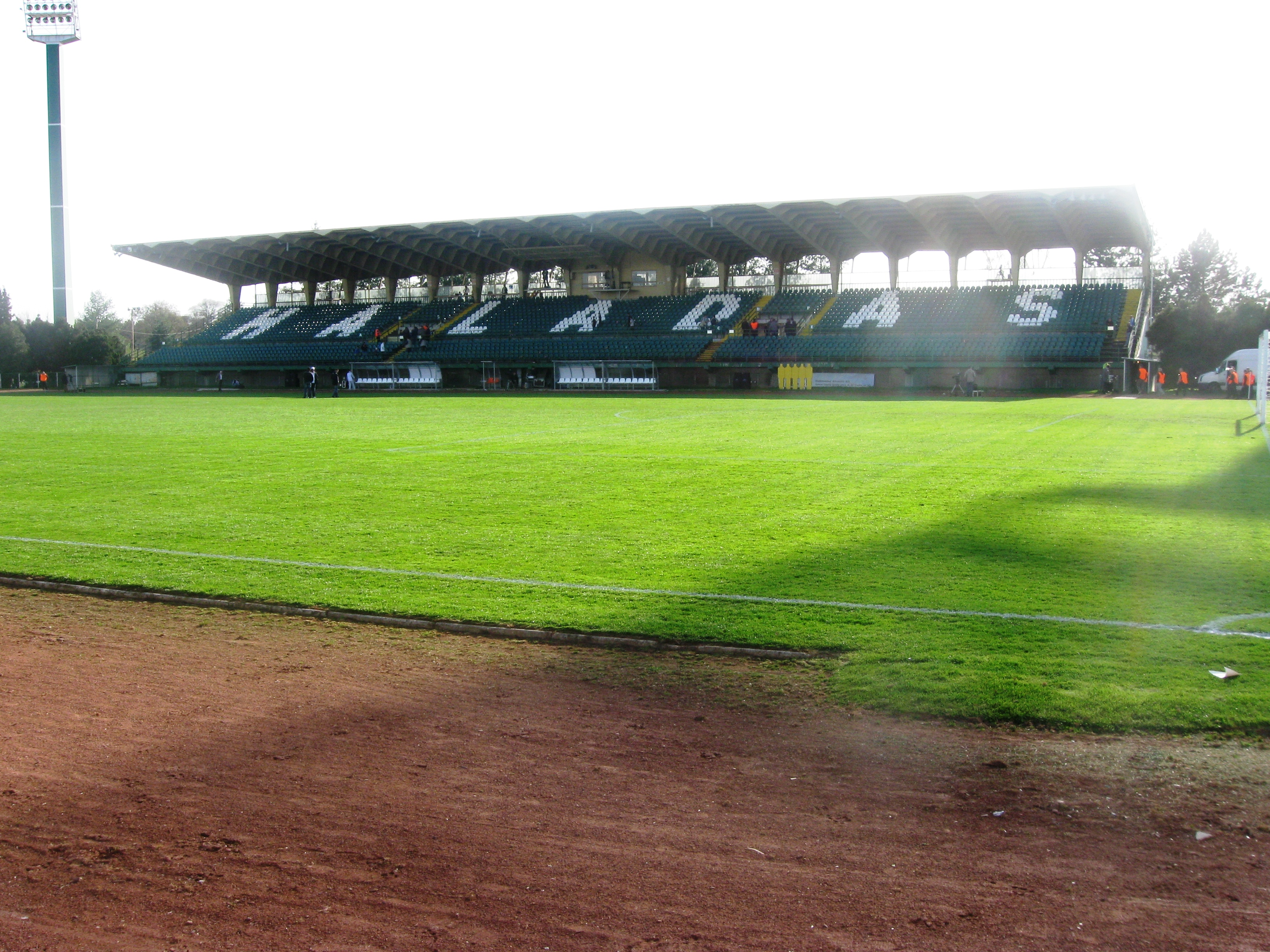 A szombathelyi Rohonci úti stadion 2010-ben